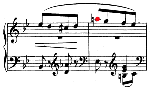 aus Robert Schumenn, Waldszenen: Einsame Blumen